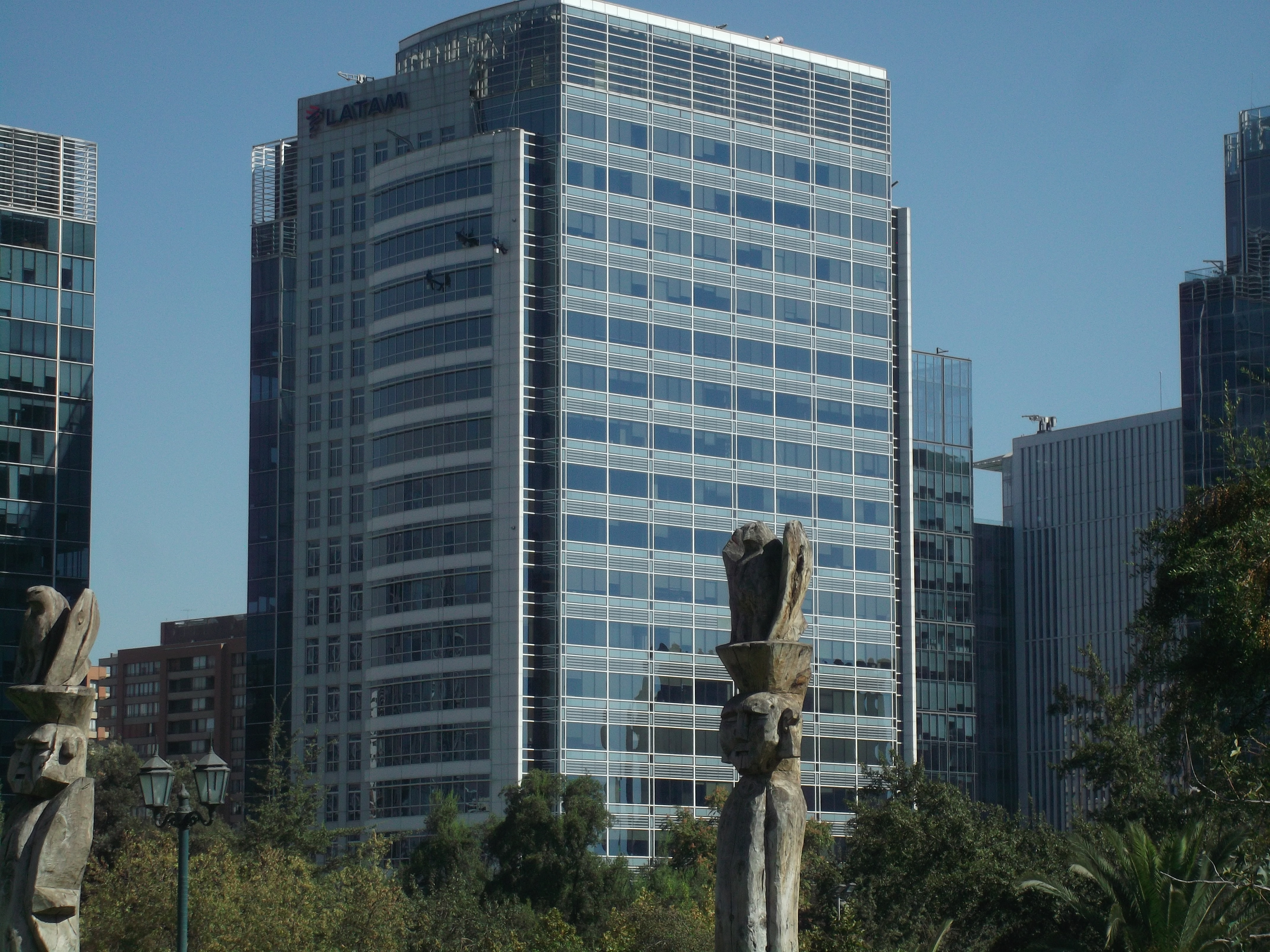 LATAM Airlines headquarters, Las Condes, Santiago, Chile.